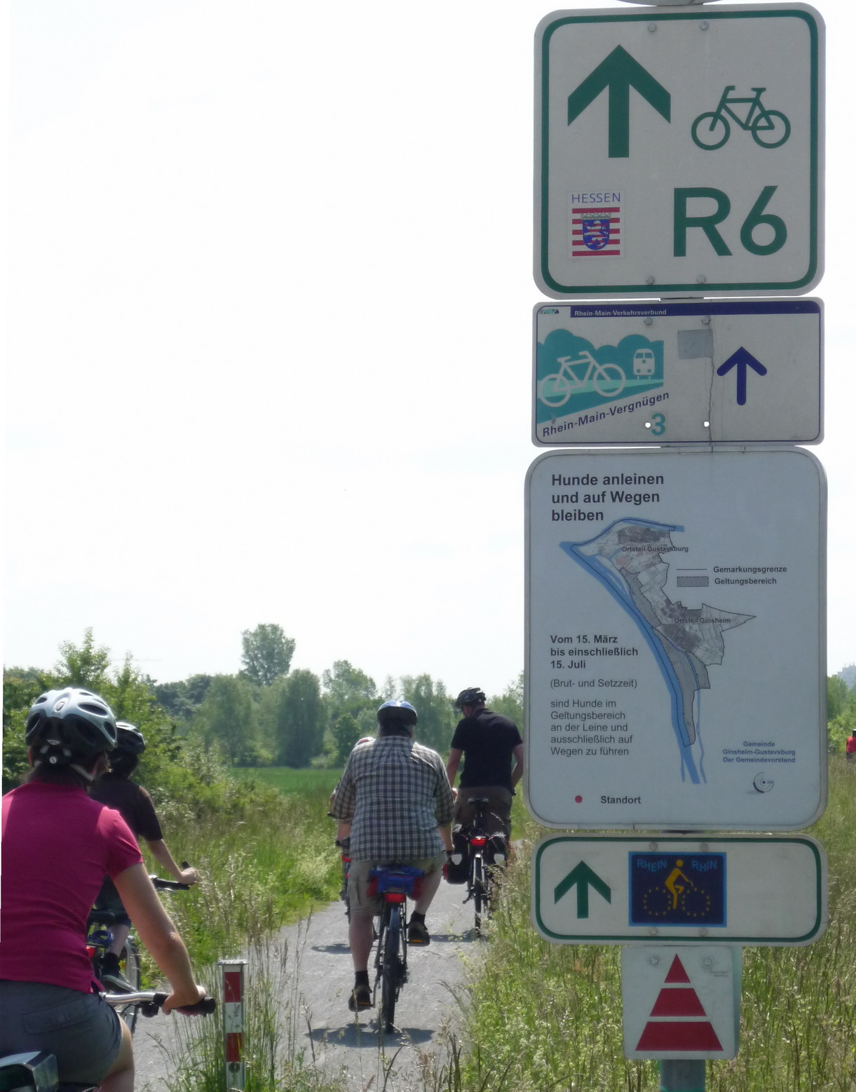 Rhein-Radweg (Rheinradweg) auf dem Rheindeich zwischen Gustavsburg und Ginsheim im Hessischen Ried.